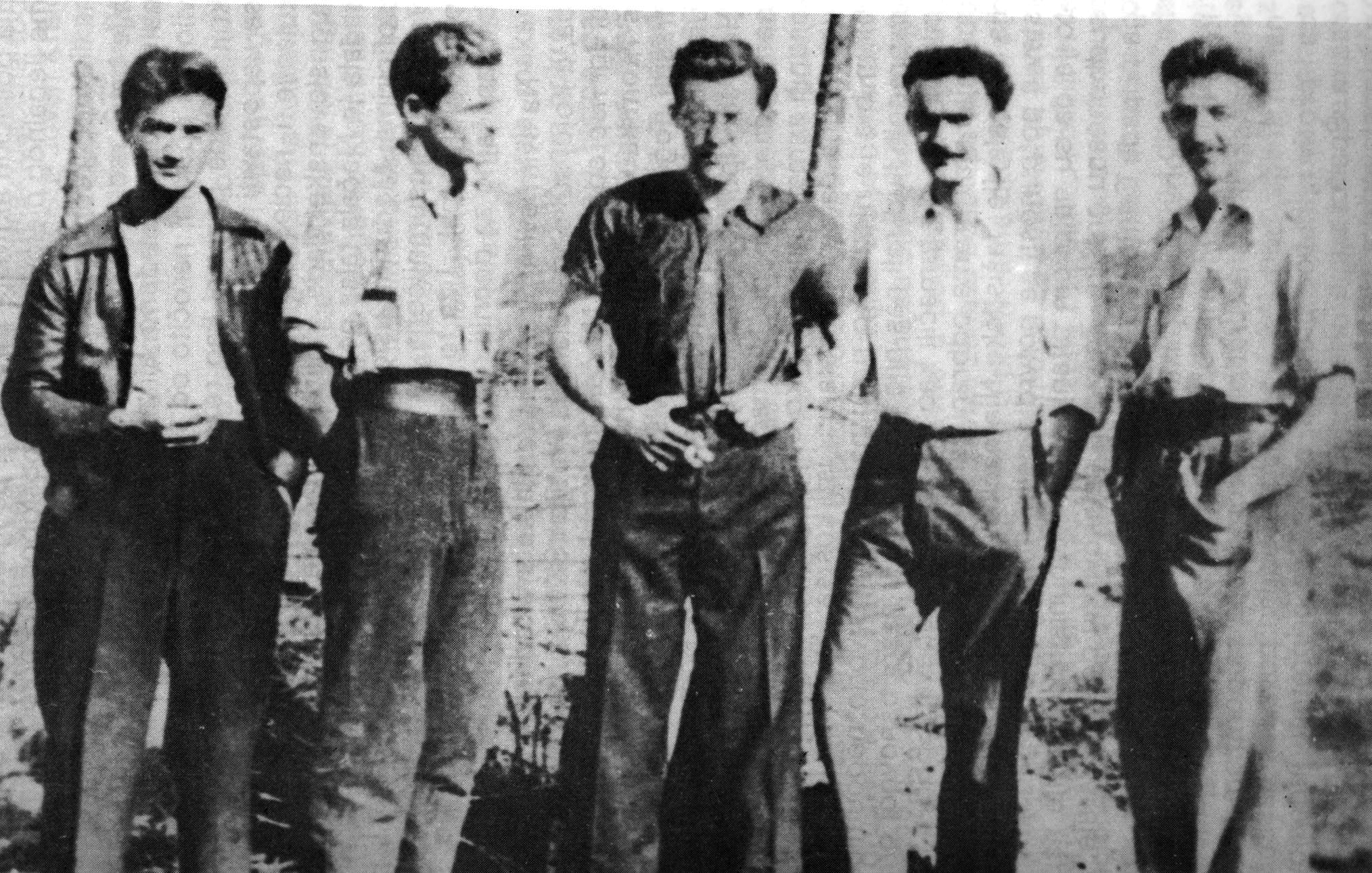 Dobrovoljci u Španjolskom građanskom ratu iz Sarajeva u zarobljeništvu u Girsu u Francuskoj: Vojo Todorović Lerer, Srećko Manola, Miljenko Cvitković, Ilija Engel i Ahmet Fetahagić